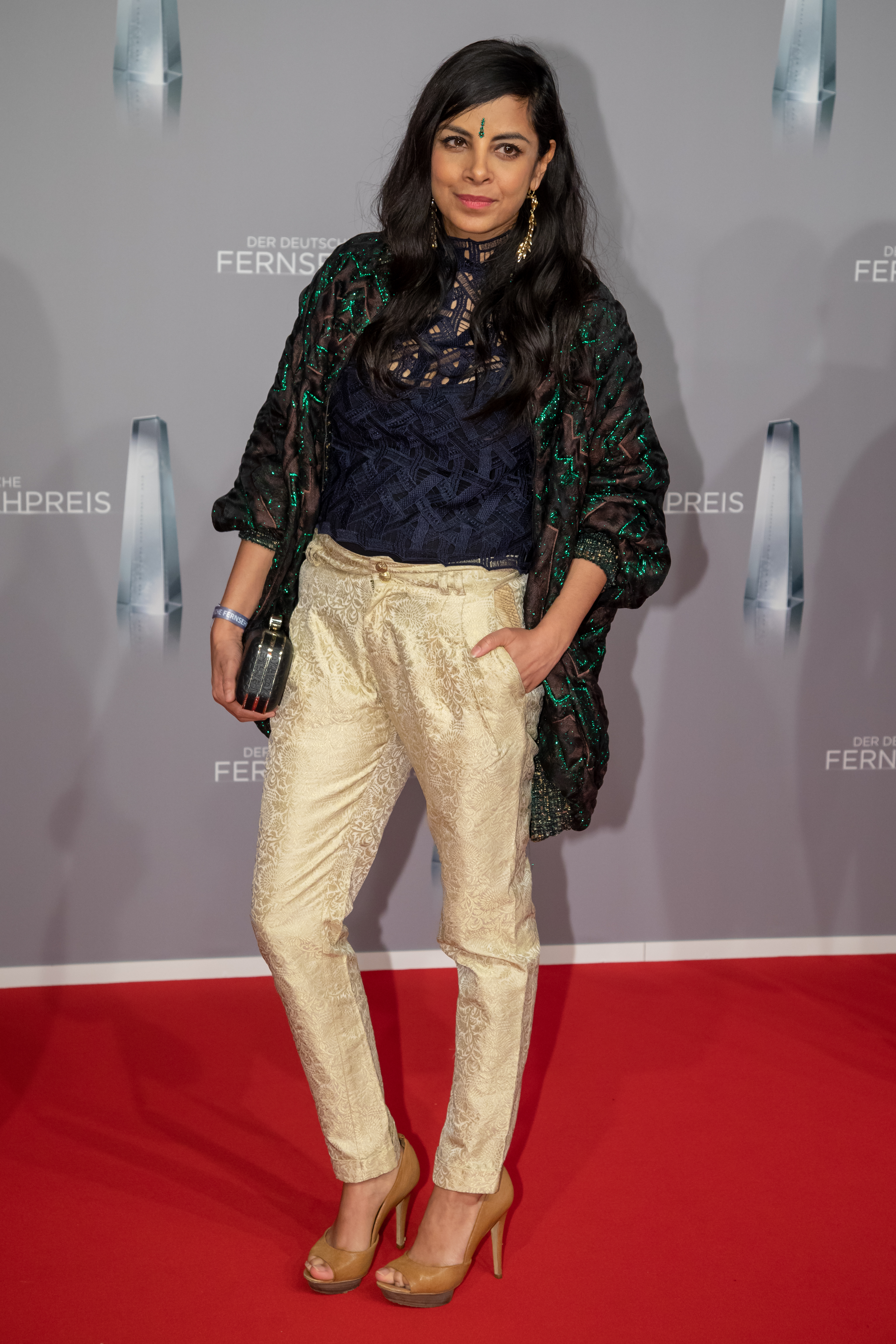 Collien Ulmen-Fernandes beim Deutschen Fernsehpreis 2019 in der Düsseldorfer Rheinterrasse